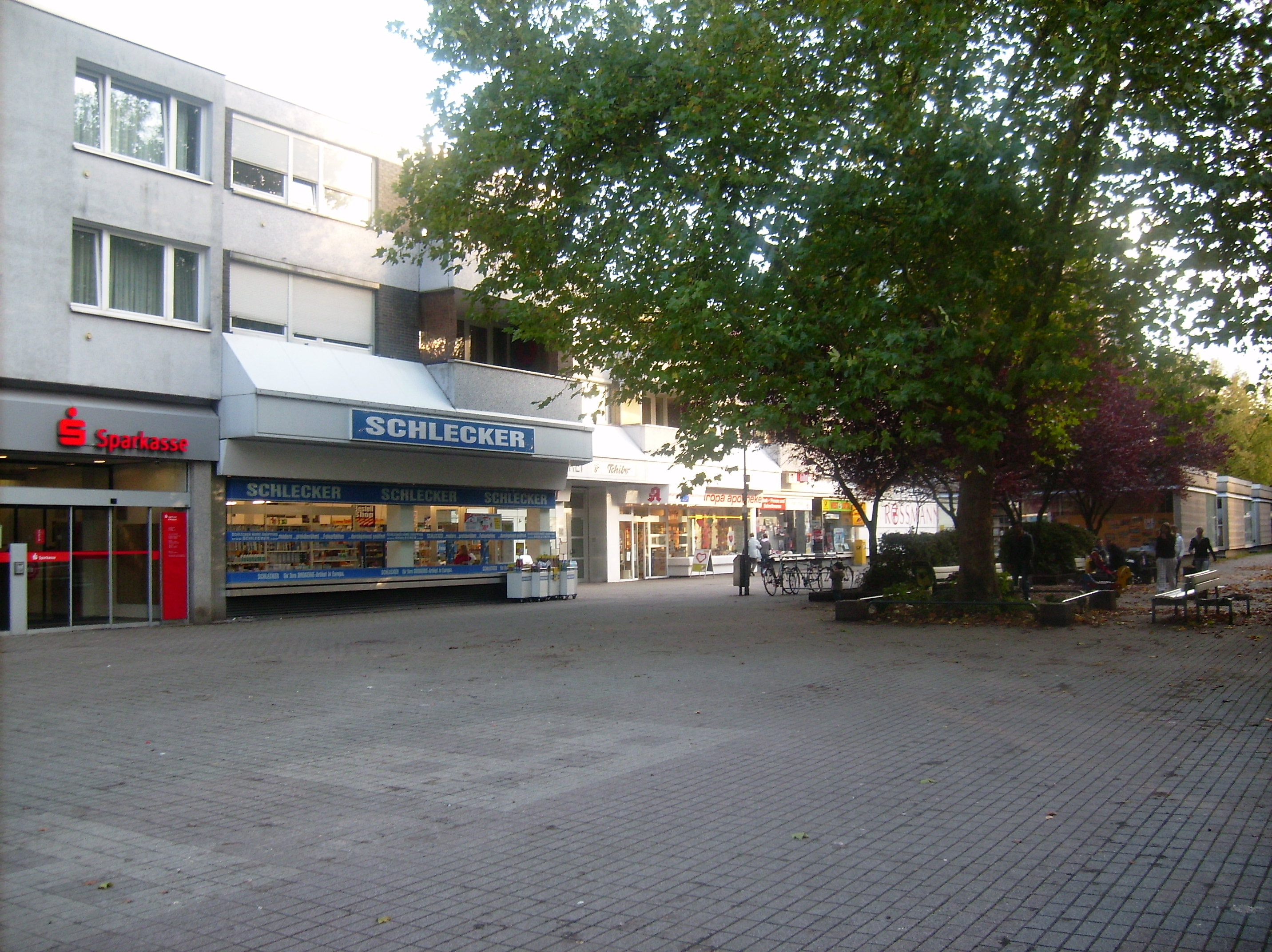 Nordansicht der Ladenstraße in Köln-Neubrück